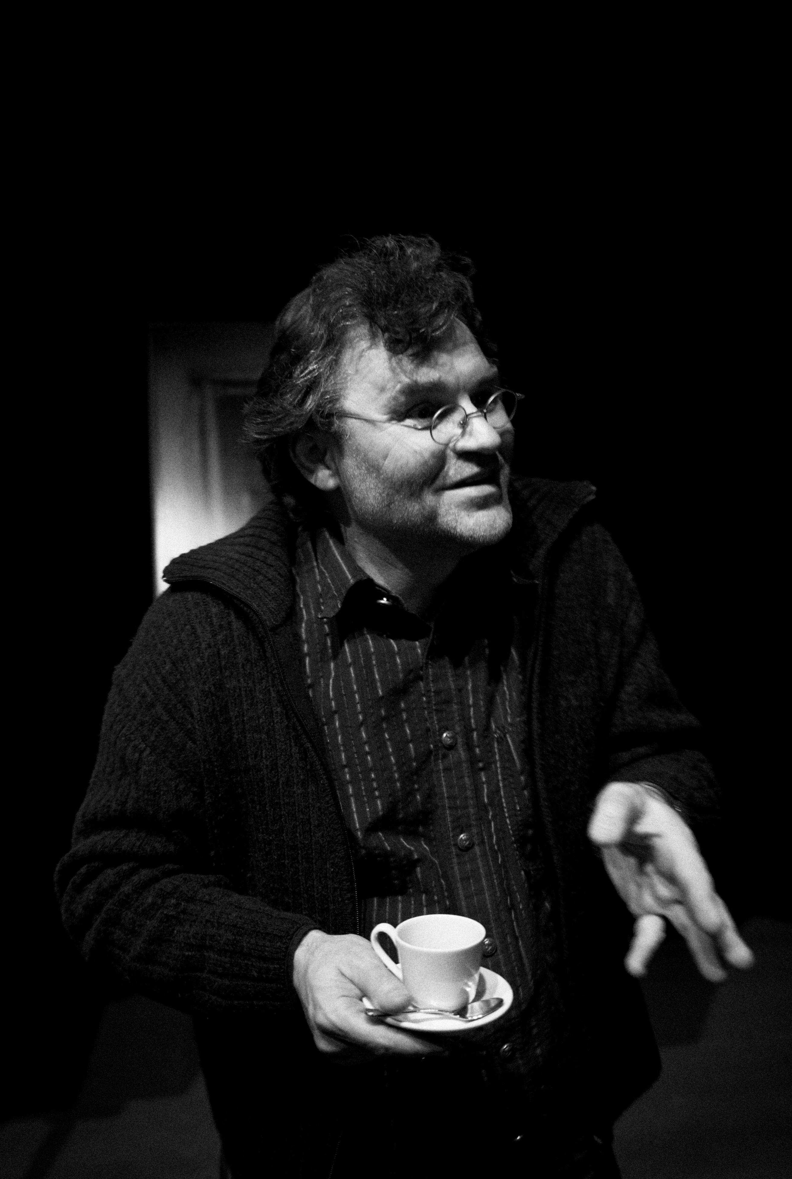 L1000669